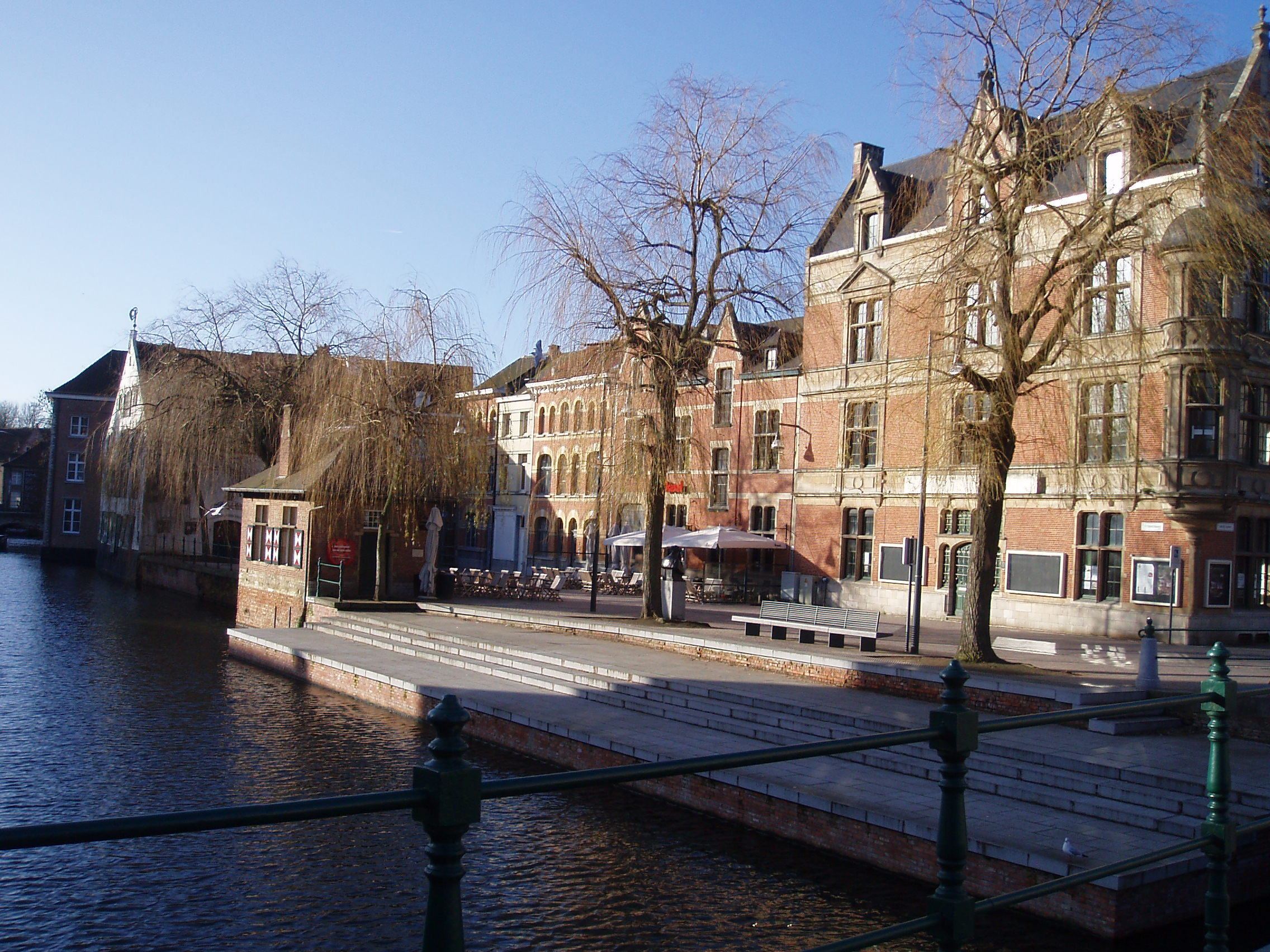 Felix Timmermansplein Lier